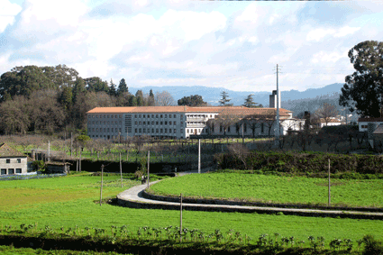 Mosteiro de Singeverga